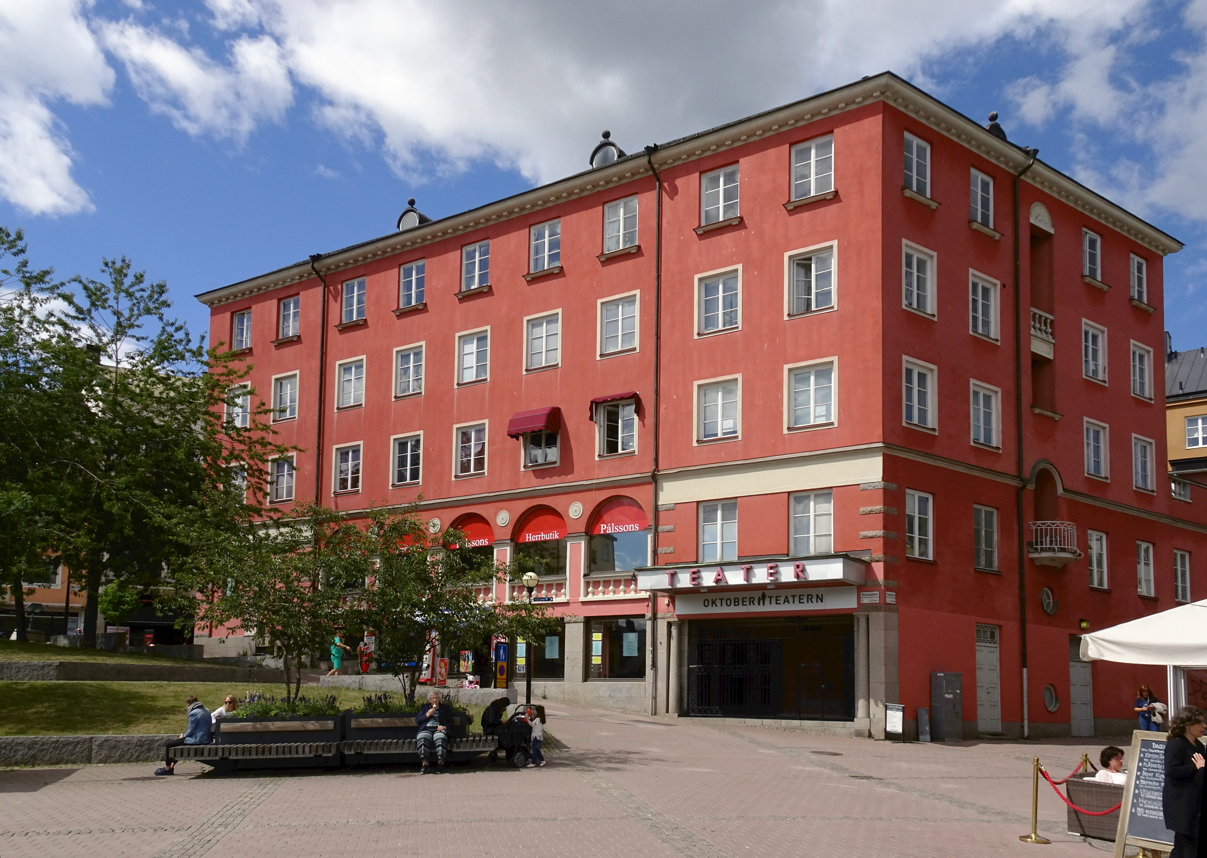 Fastigheten Castor 5, Storgatan 2A/Slussgatan 1. Arkitekt Tore E:son Lindhberg (1928). Castor var stadens största biograf med 600 sittplatser. Lindhberg ritade salongen och den klassicistiska inredningen utfördes av Einar Forseth och John Broberg. Castor var först med ljudfilm.